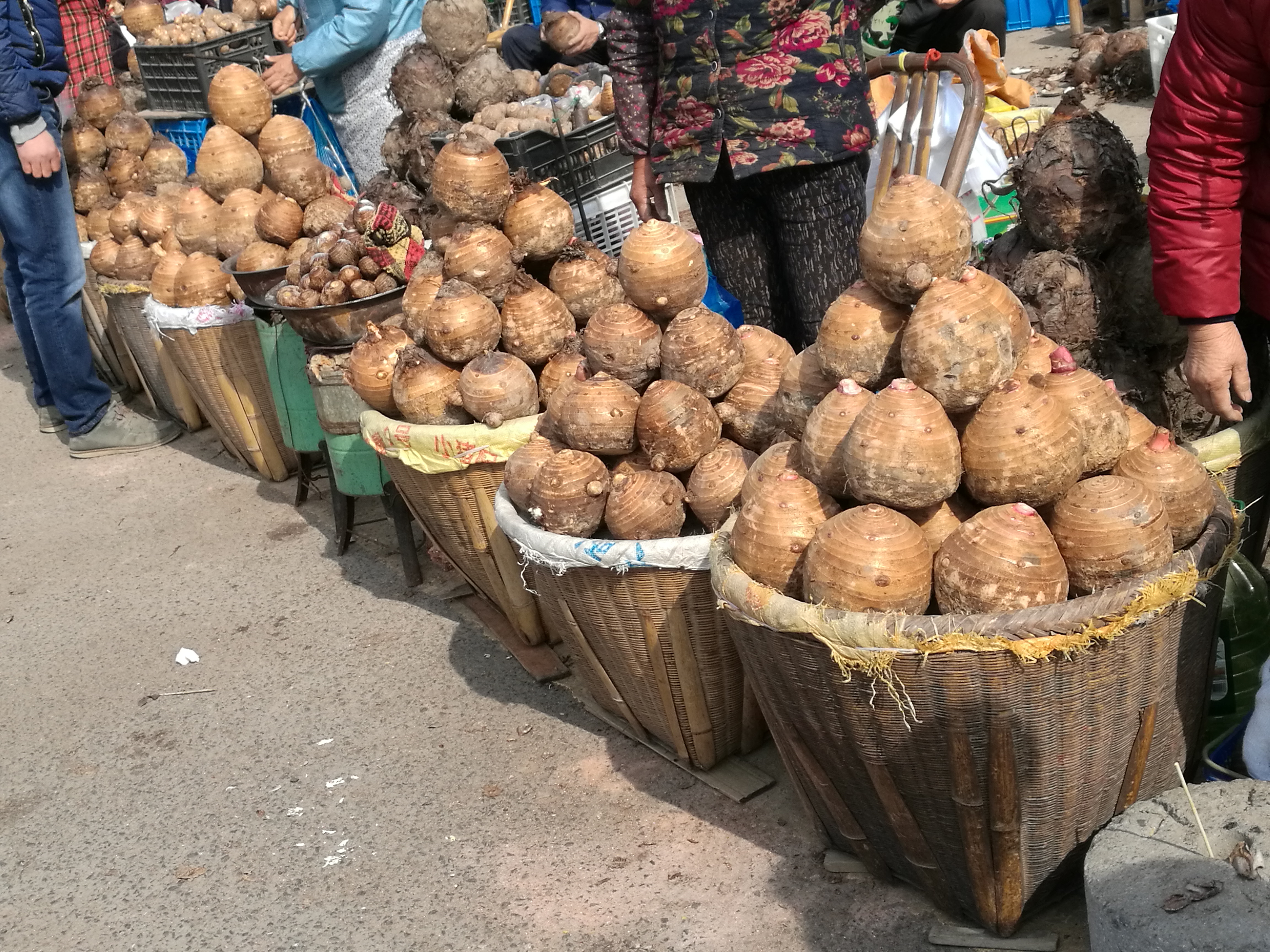 溪口镇的芋头